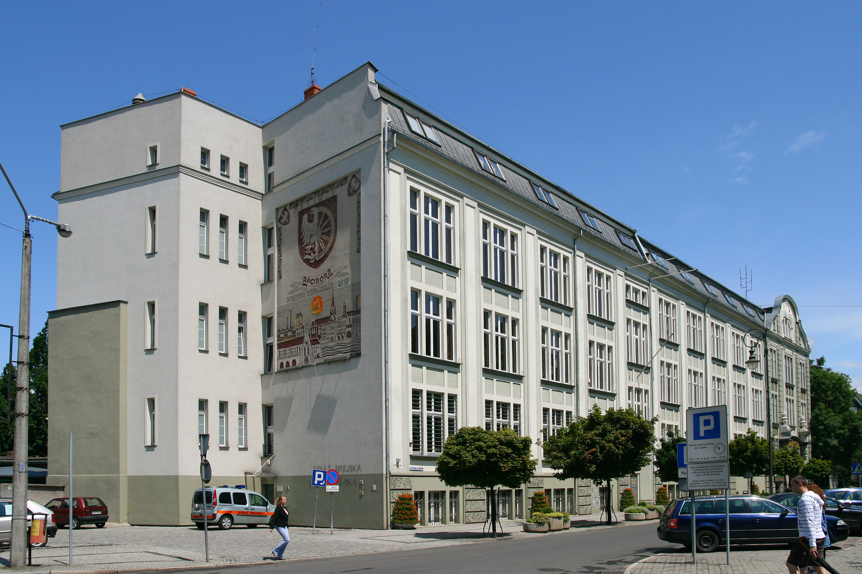 Racibórz, ul. Króla Stefana Batorego 6 - dawna fabryka czekoklady, obecnie Urząd Miasta